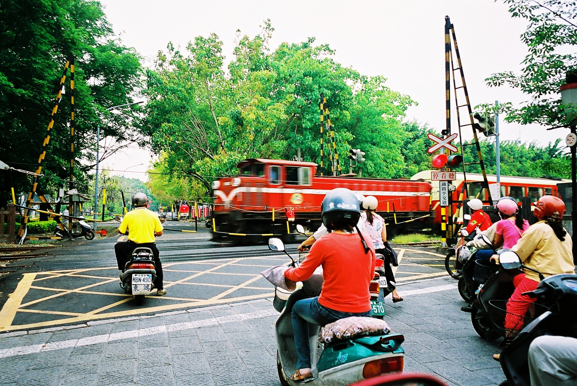 GR1v 路過 阿里山小火車 / 說到隨身相機，就是要可以隨時掏出來ㄚ~ GRD如是，GR1v更是如此 在嘉義四年第一次遇到阿里山小火車路過，還好我有GR1v 從包包掏出，對焦，快門 ~阿里山小火車~ Alishan Forest Railway Level crossing